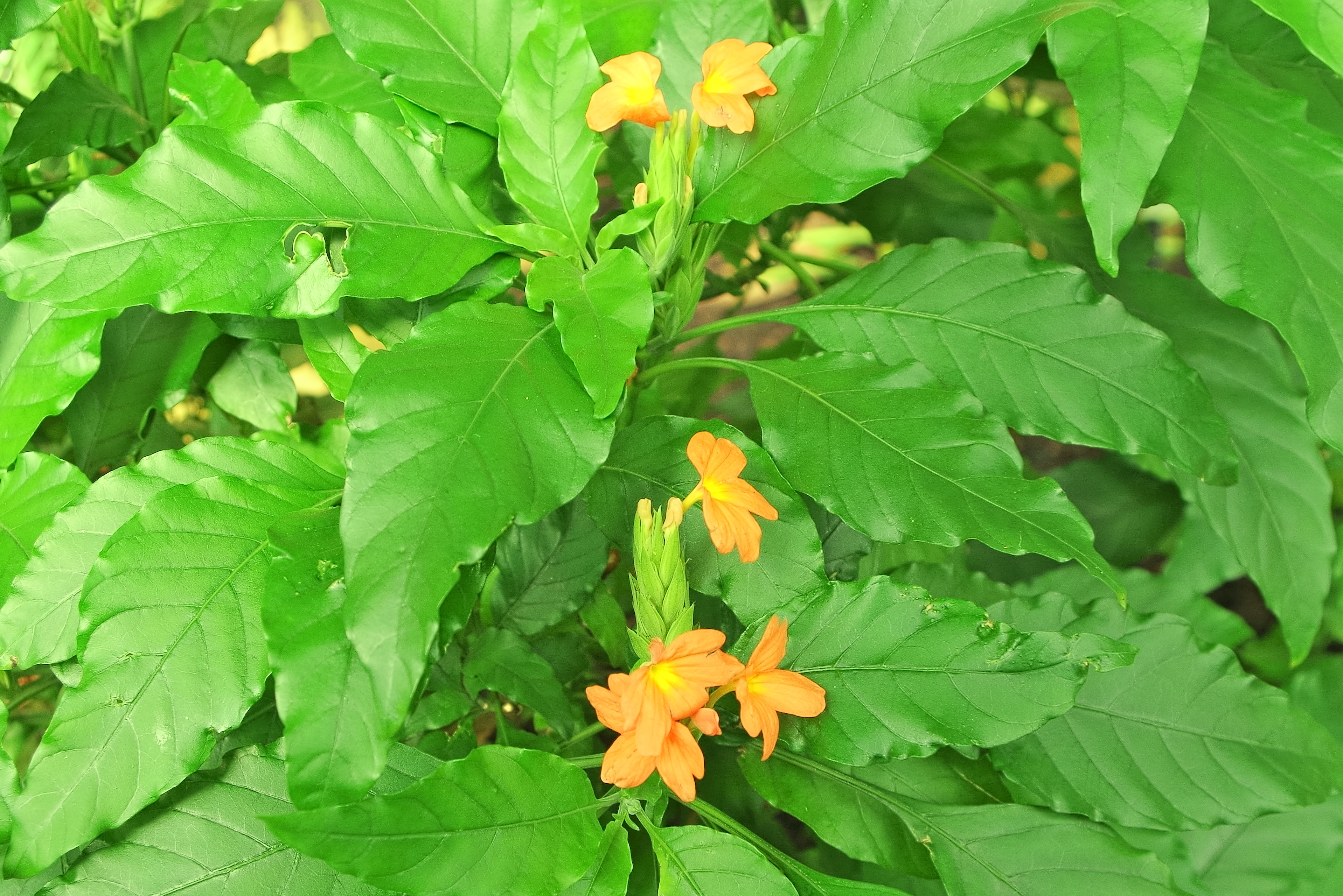 Crossandra massaica (close up) - Palm house Kew Gardens